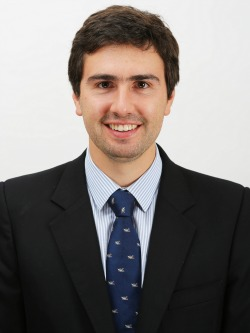 Diego Paulsen Kehr